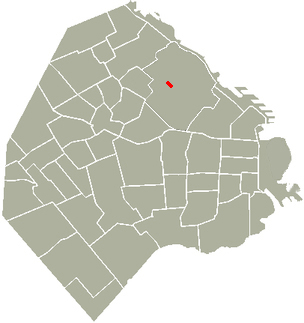 Túnel de Cabildo